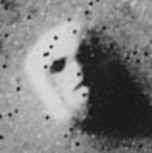 Il celebre volto su Marte ripreso dalla sonda Viking 1 nella sua missione sul pianeta rosso.